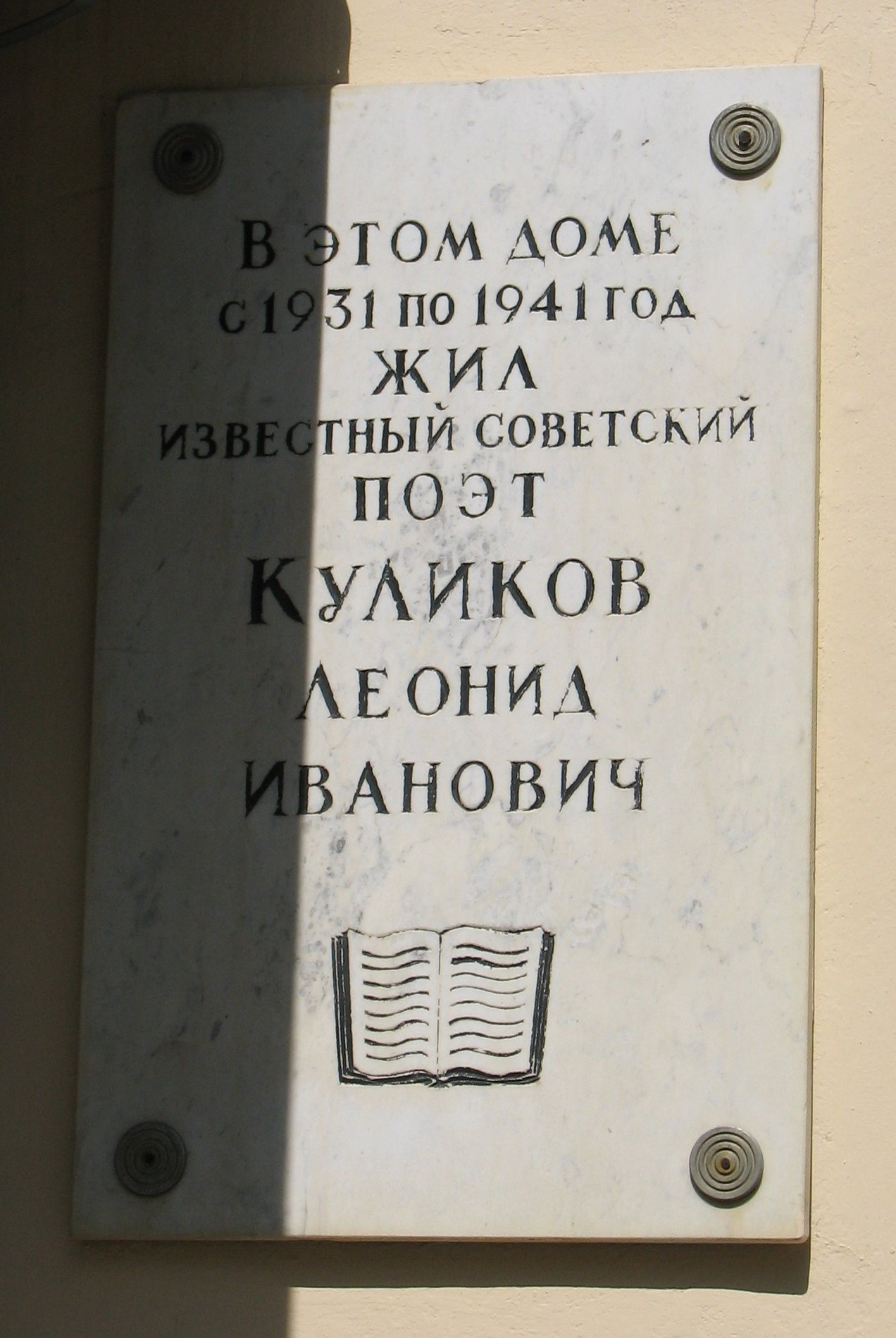 Мемориальная доска, посвящённая Леониду Ивановичу Куликову. Соборная улица, Гатчина